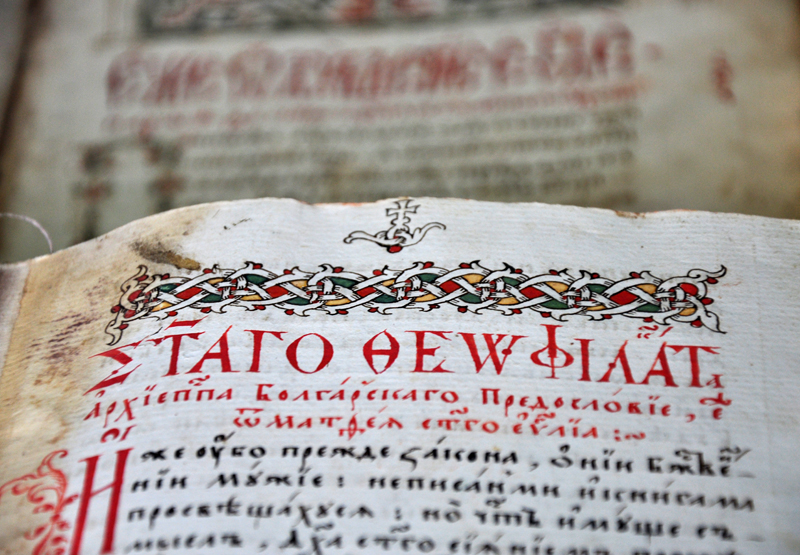 Српски (ћирилица): Стари рукопис 01